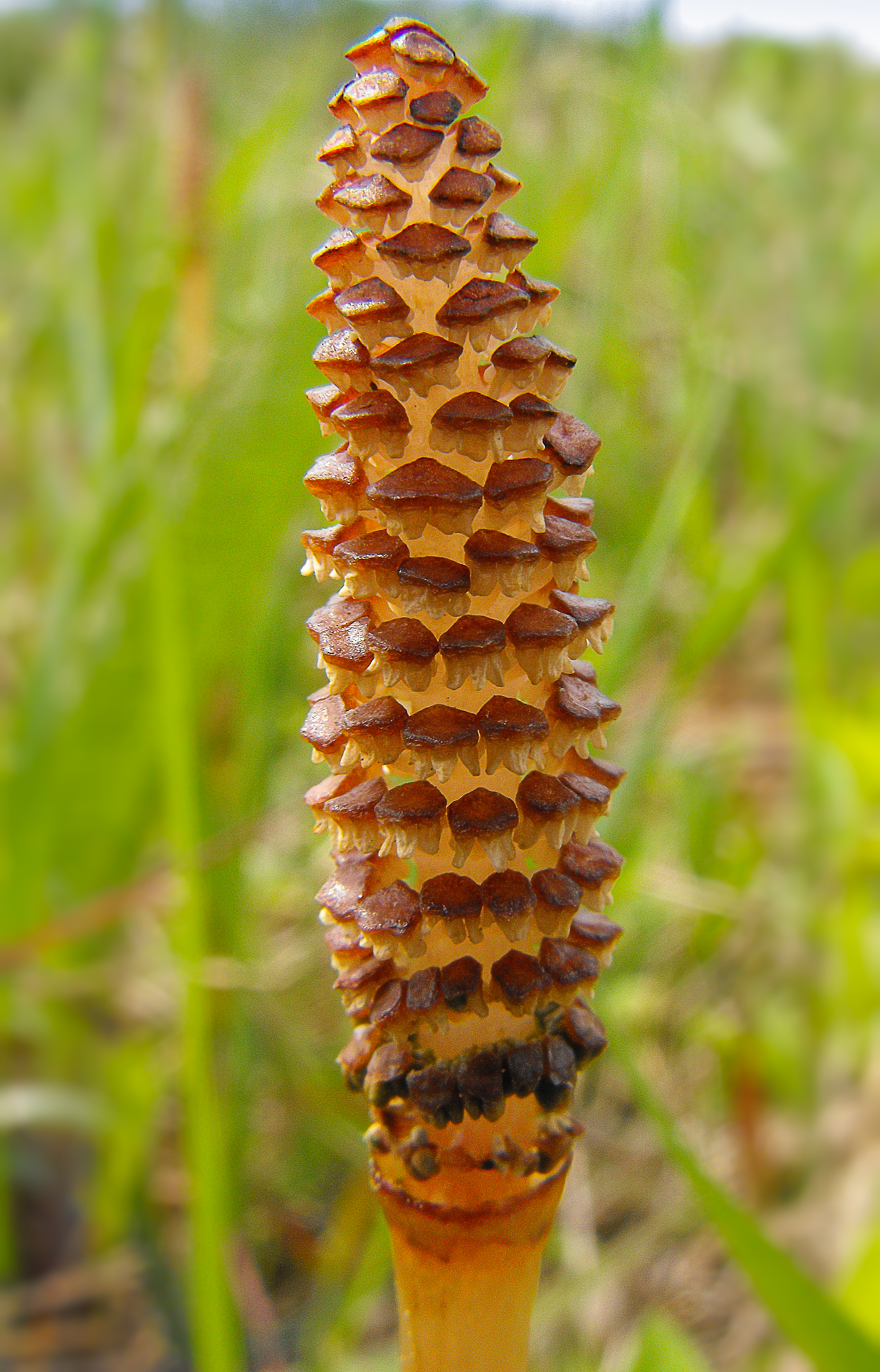 Mezei zsurló spórafüzére (Marosvásárhely)